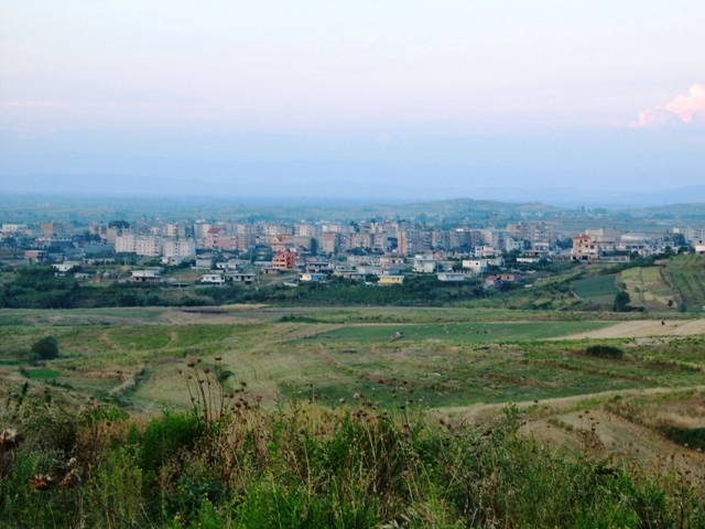 Patos (Albania)